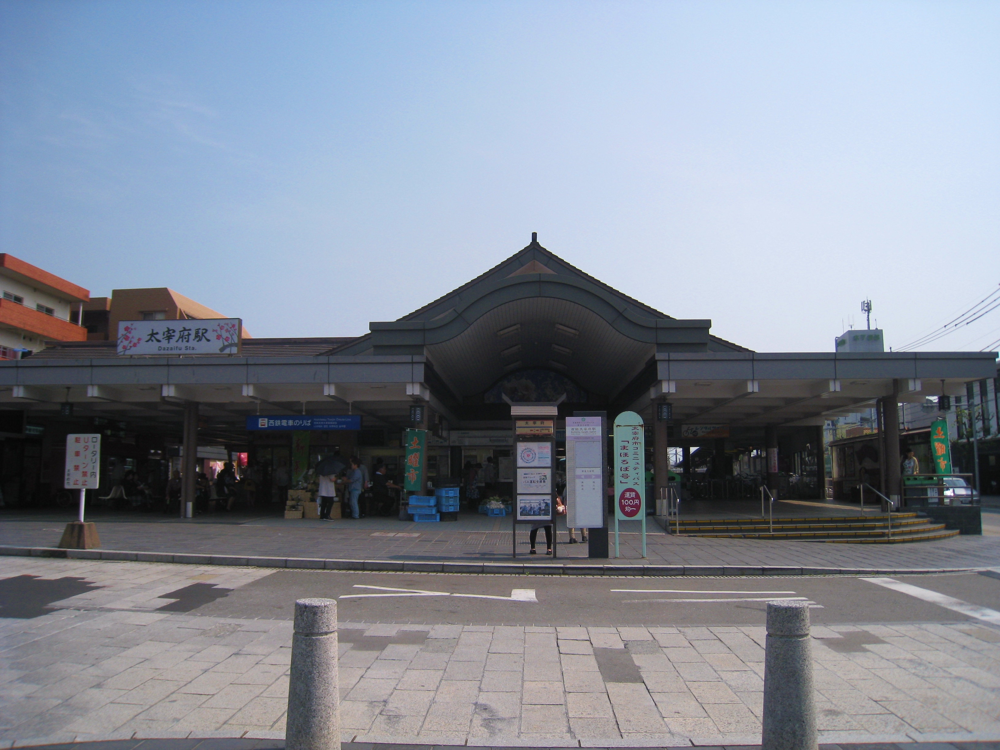 太宰府駅駅舎